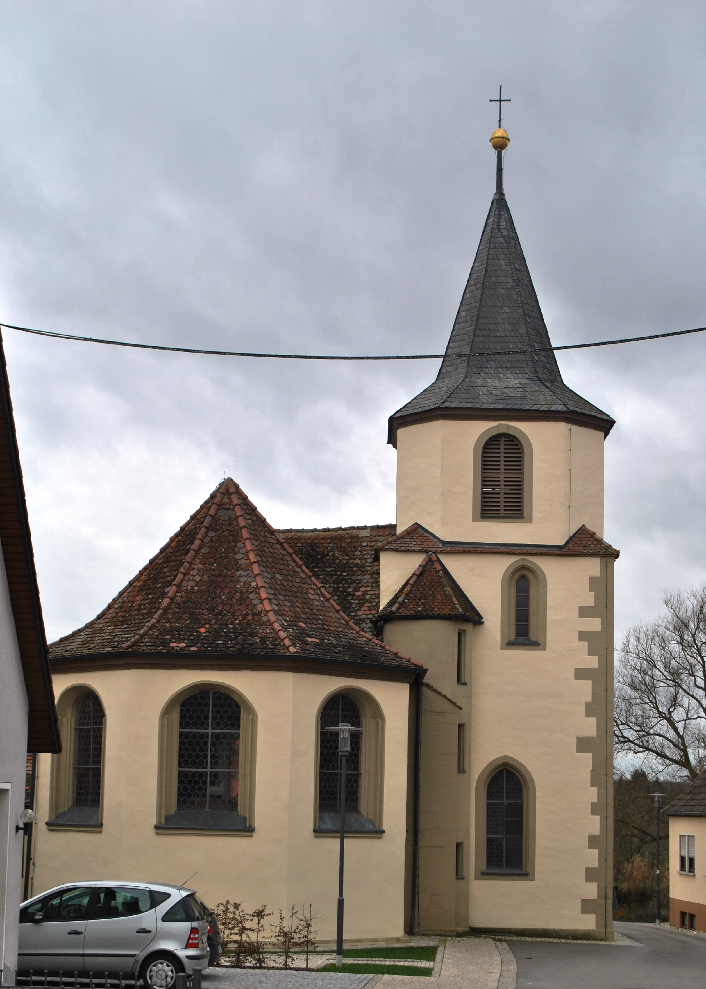 Katholische Filialkirche St. Maria ehemalige Augustinerchorherren-Stiftskirche, dreiseitig geschlossener Chor und nördlich angelehnter Turm 1458-1463, ursprüngl. Bau nach Plänen von Johann Michael Fischer umgebaut, Langhaus 1789, Westfassade 1789/94; mit Ausstattung